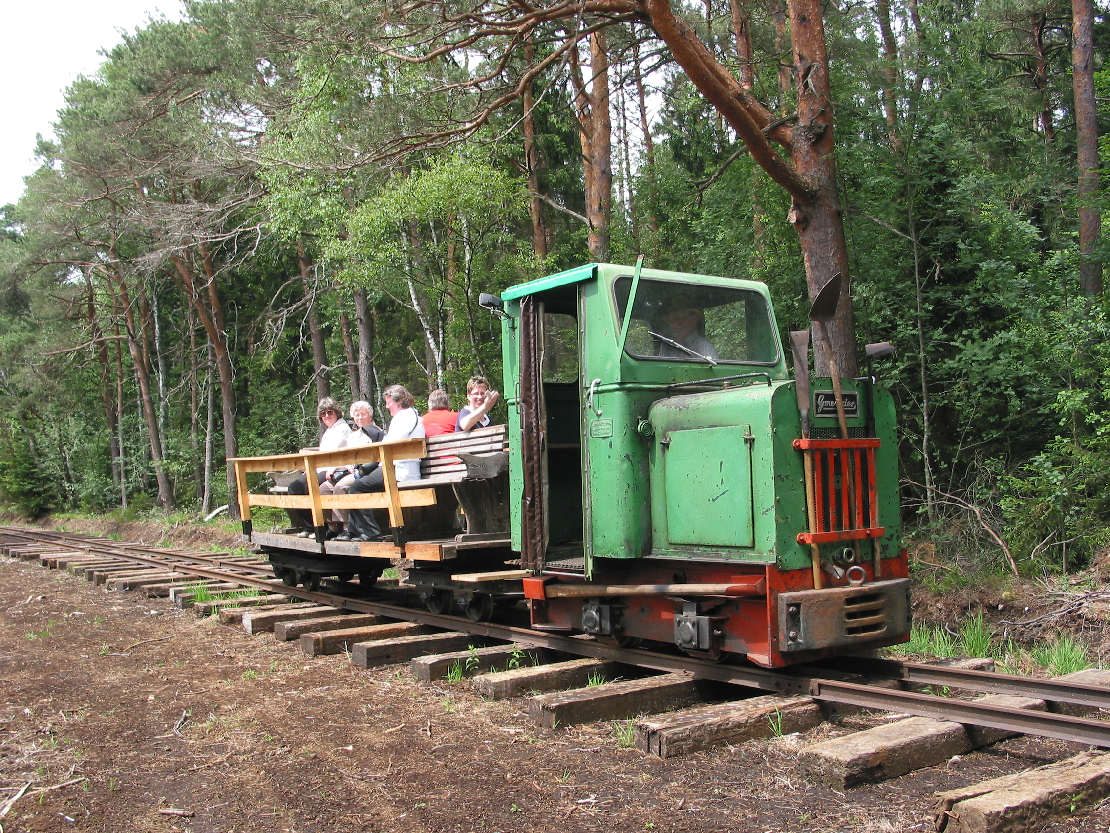 Torfbahn Ainring mit DGEG-Gruppe